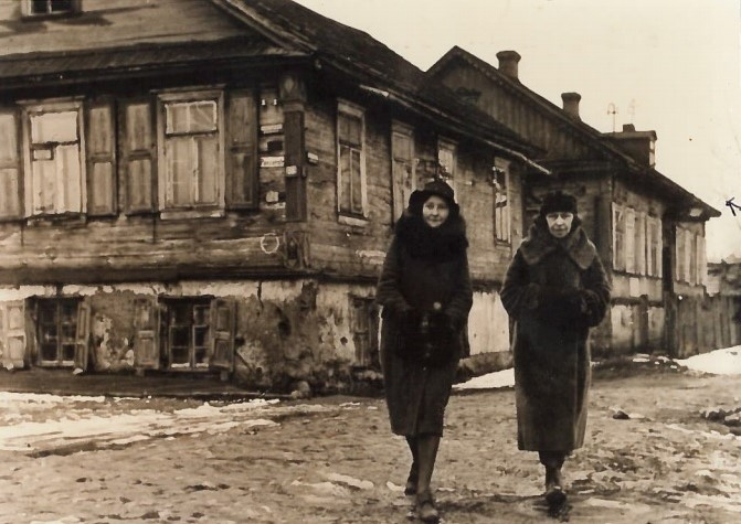 Беларуская (тарашкевіца): Менск (Miensk), вуліца Садовая (vulica Sadovaja). Дамы братоў Луцкевічаў (Łuckievič). На фотаздымку: Яніна Каханоўская (бабуля Данчыка) і Эмілія Луцкевіч-Шабуня (прабабуля, сястра Івана і Антона Луцкевічаў).